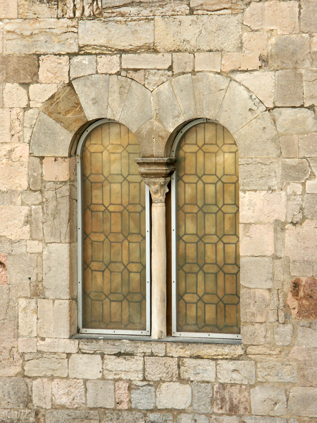 Hyères, tour Saint-Blaise ou tour des Templiers. Détail d'une fenêtre géminée.